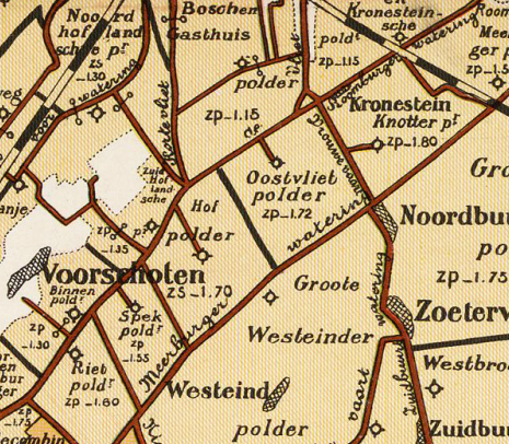 Oostvlietpolder